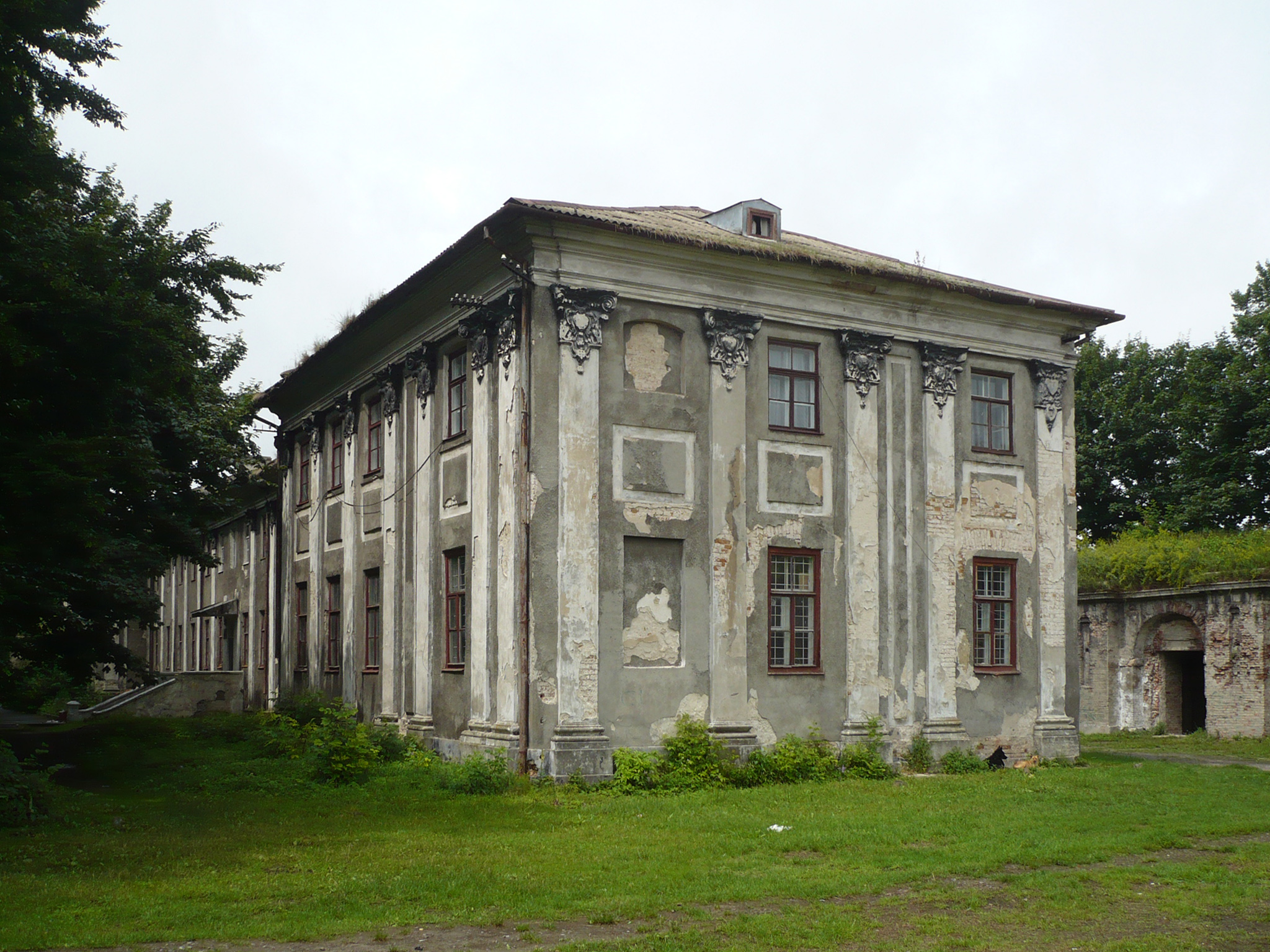 Pałac Potockich z poł. XVIII wieku w Brodach na Ukrainie